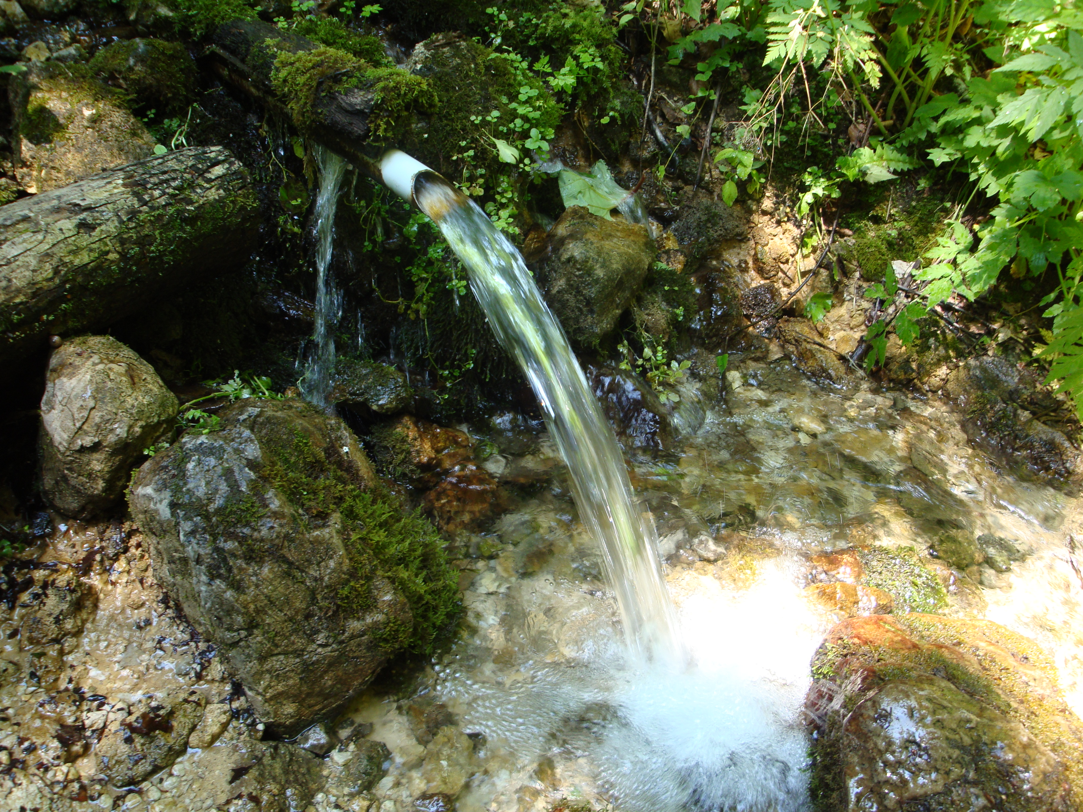 Minutnik.